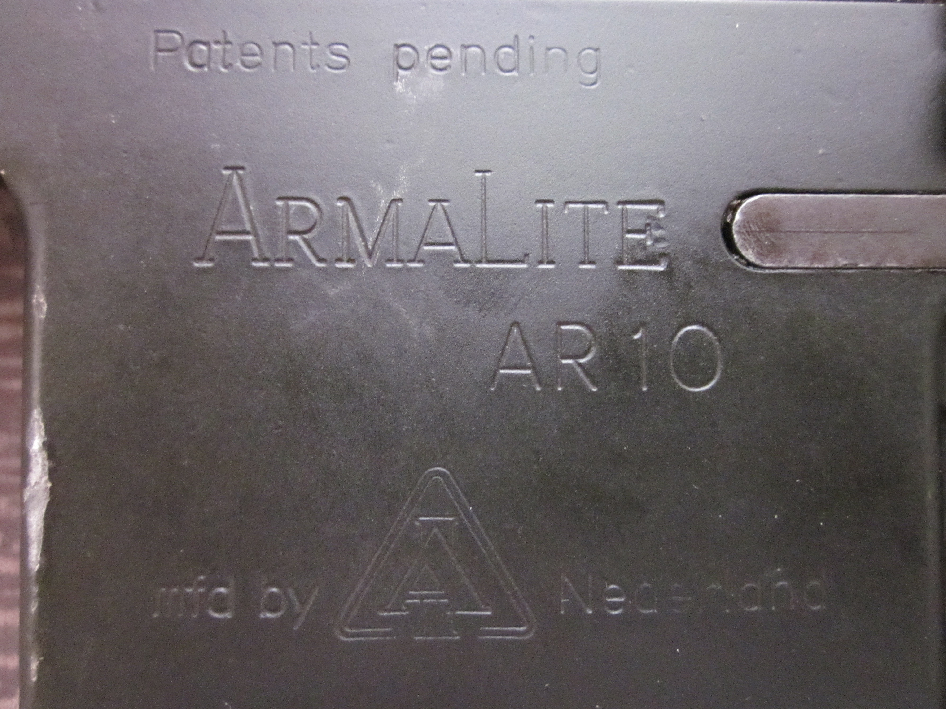 photo AR10